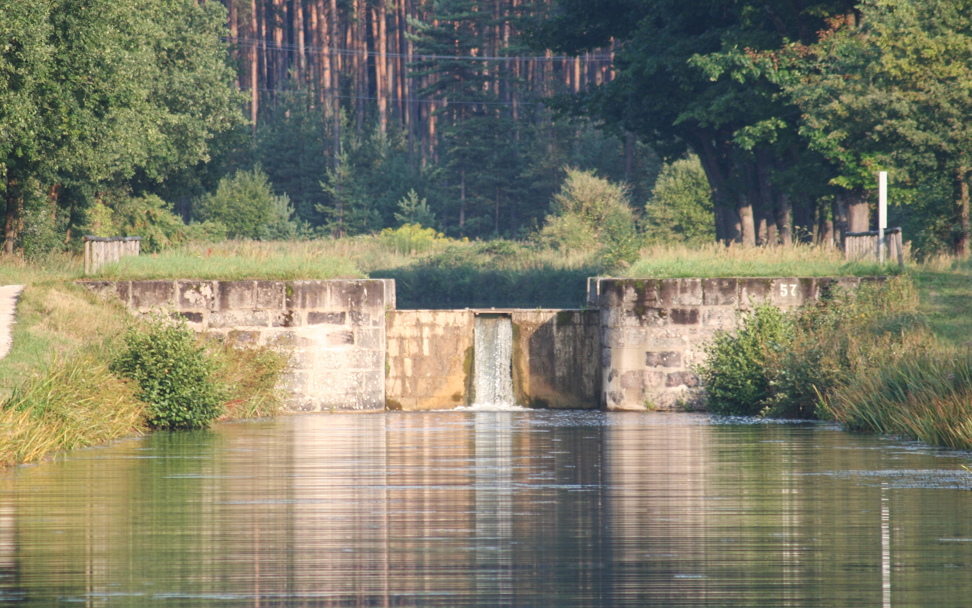 Ludwig-Donau-Main-Kanal, Schleuse 57